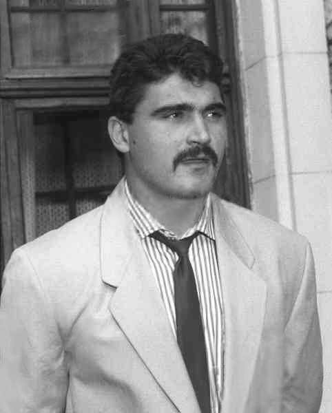 Costel Grasu in Bucharest